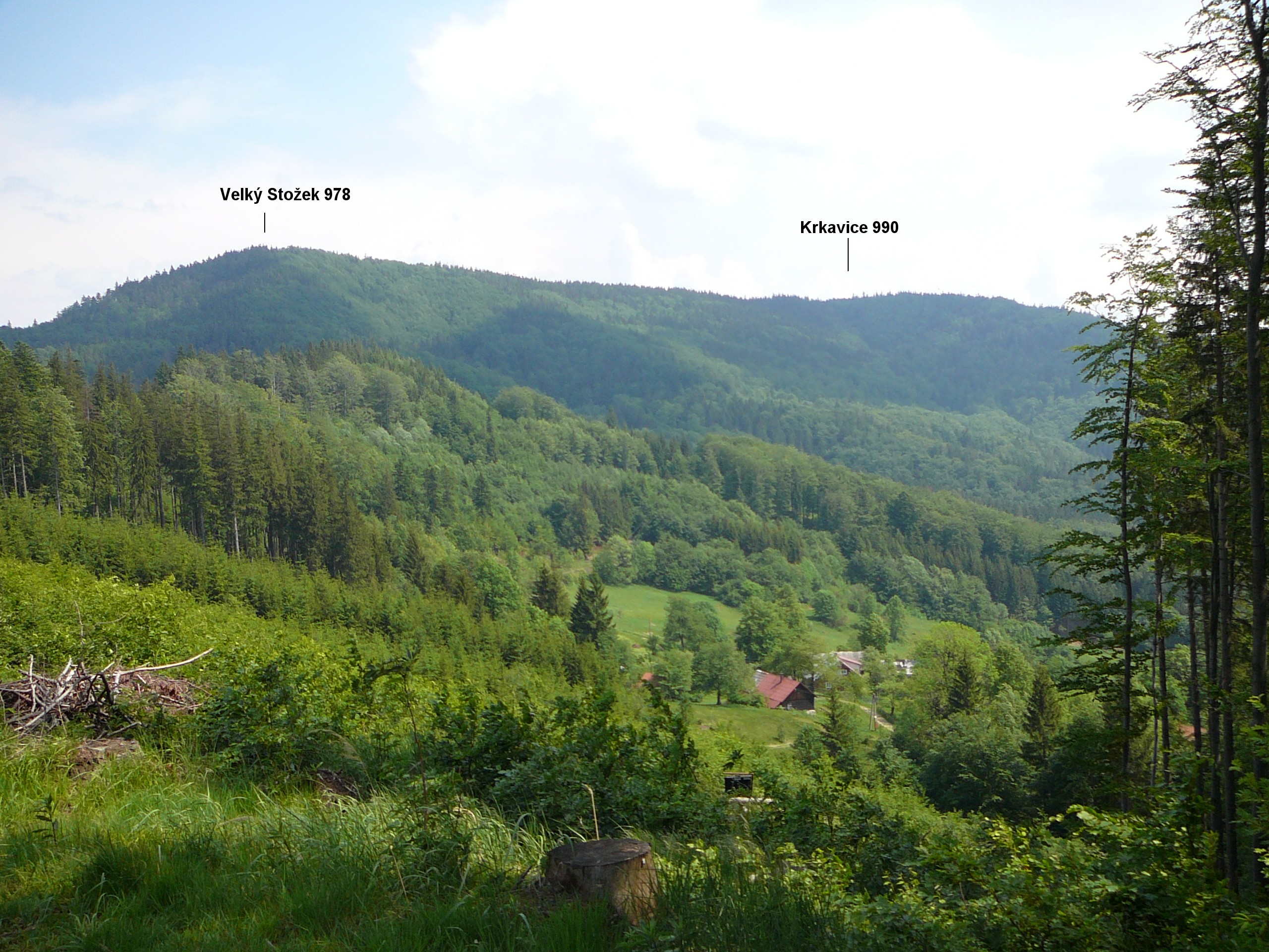 Panorama Velkého Stožku ve Slezských beskydech